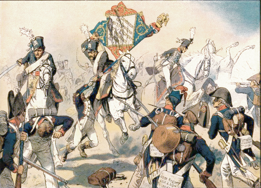 Schlacht bei Heilsberg. Hier: ›Der Ehrentag der schwarzen Husaren bei Heilsberg in Ostpreußen (10. Juni 1807)‹